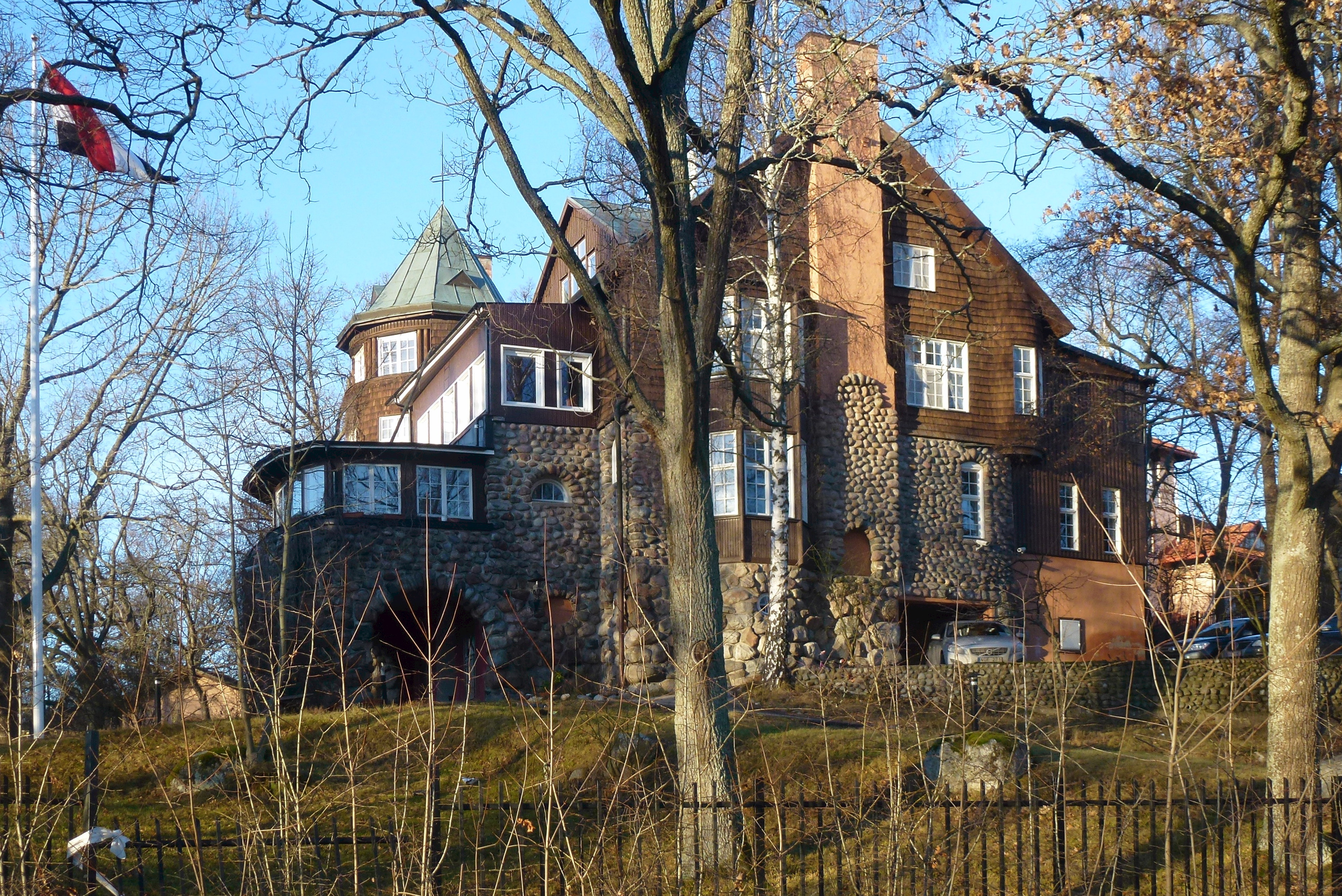 Auravägen 14 Djursholm, arkitekt Rudolf S. Enblom